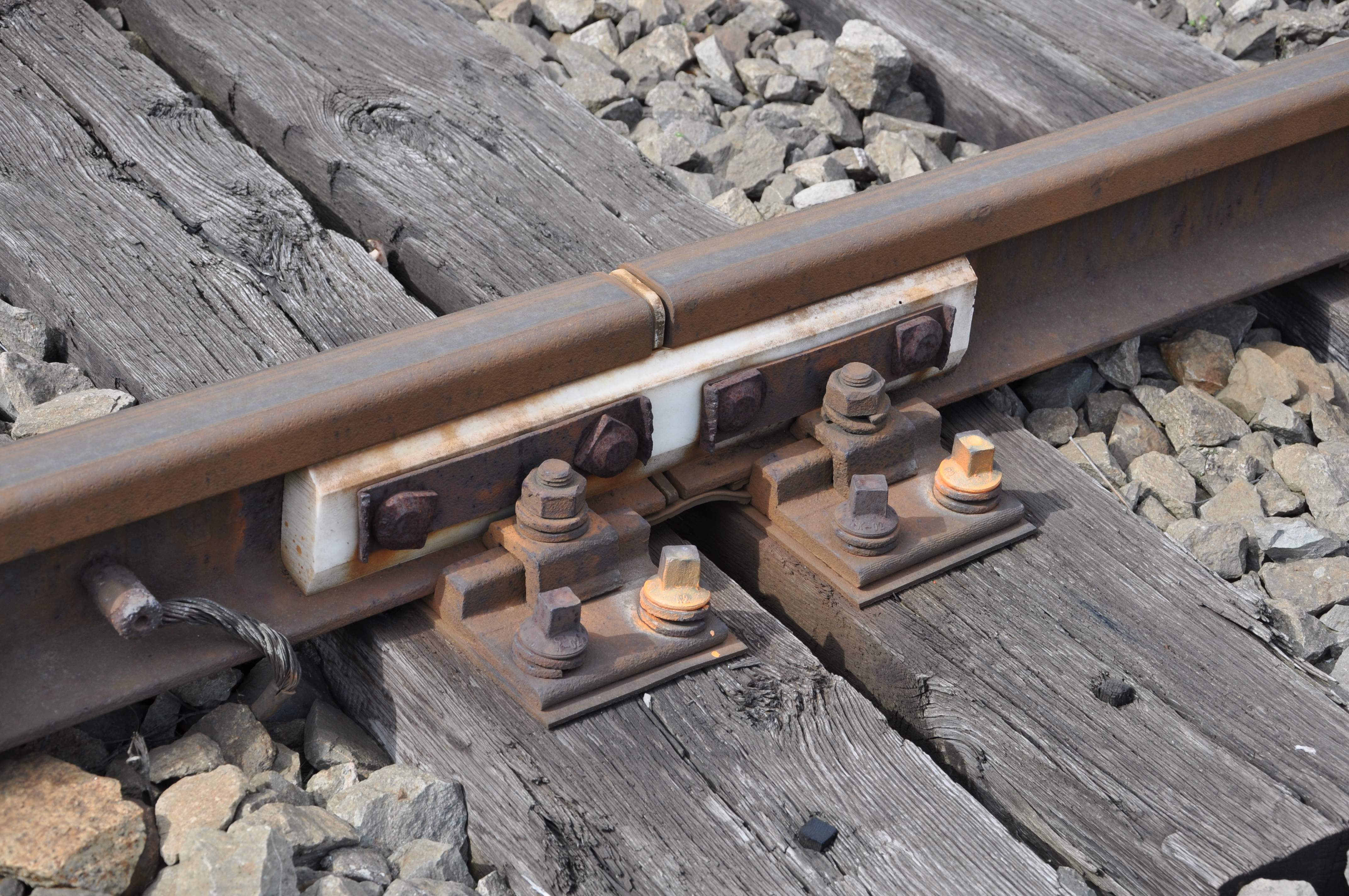 Bahnhof Chabařovice, Isolierstoß in einem Ladegleis